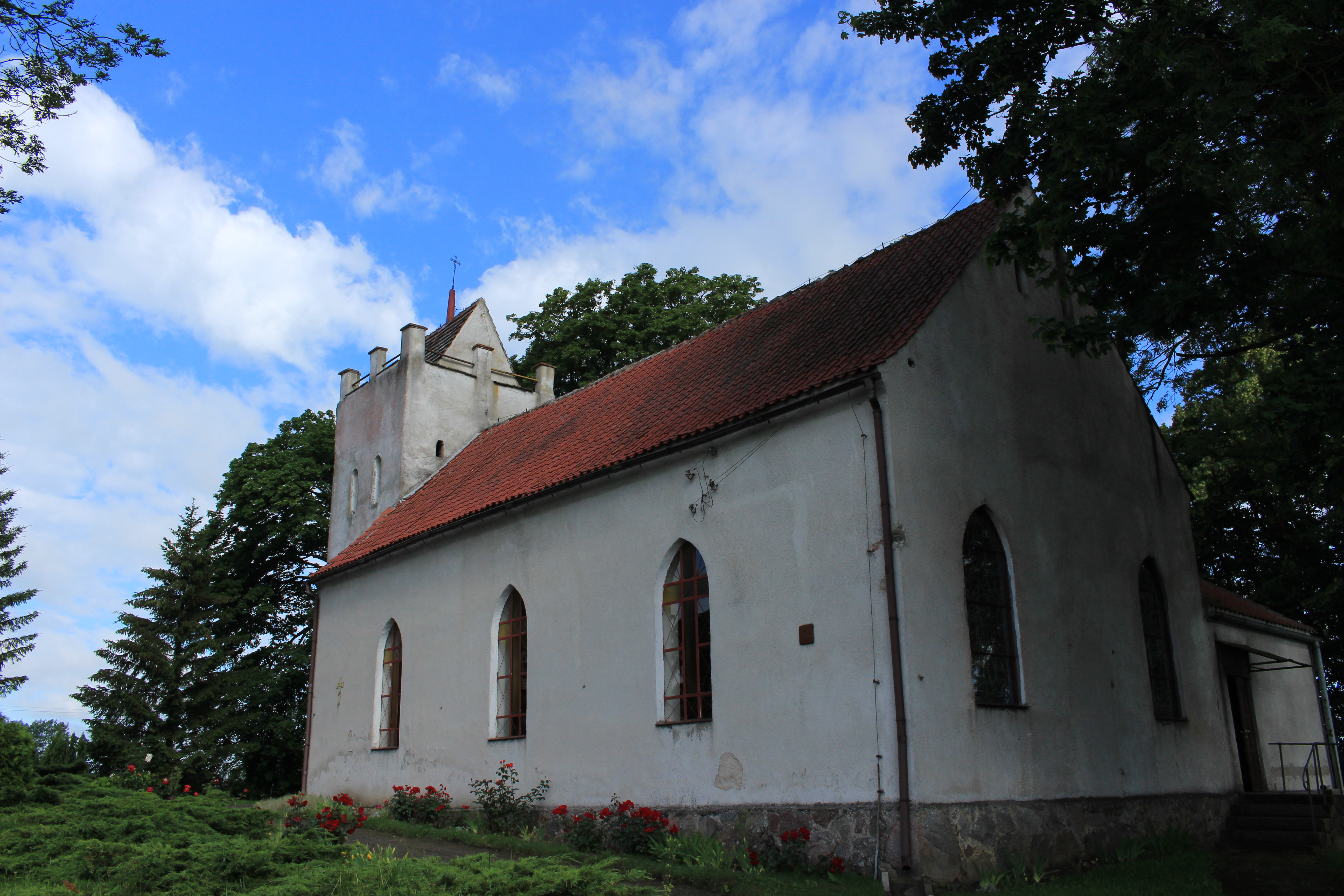 Pieńkowo - kościół